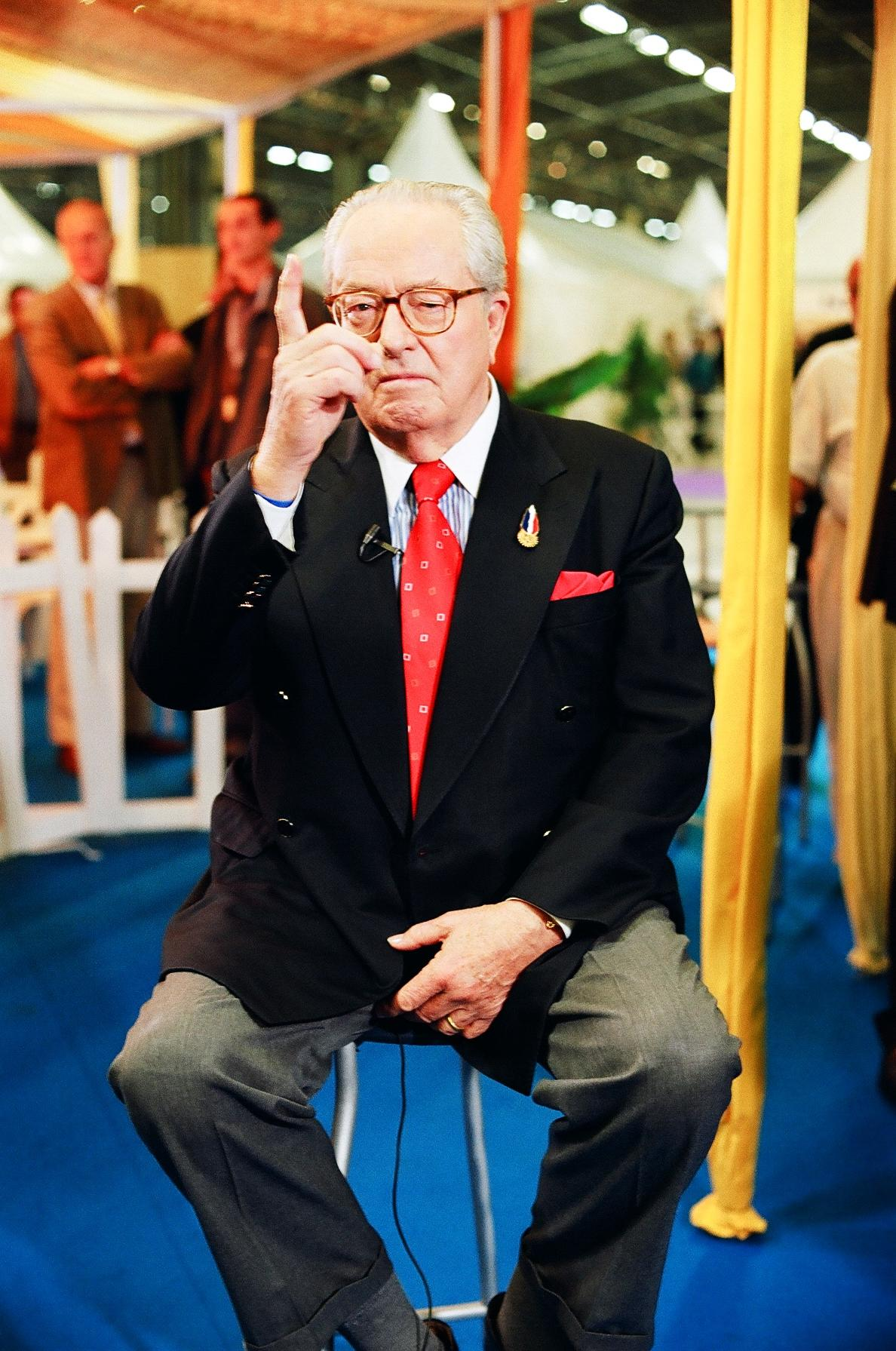 Jean-Marie Le Pen à la fête des Bleu-blanc-rouge